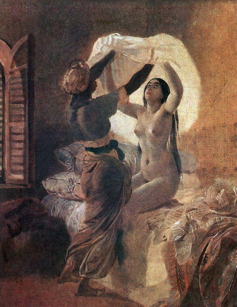 Одалиска